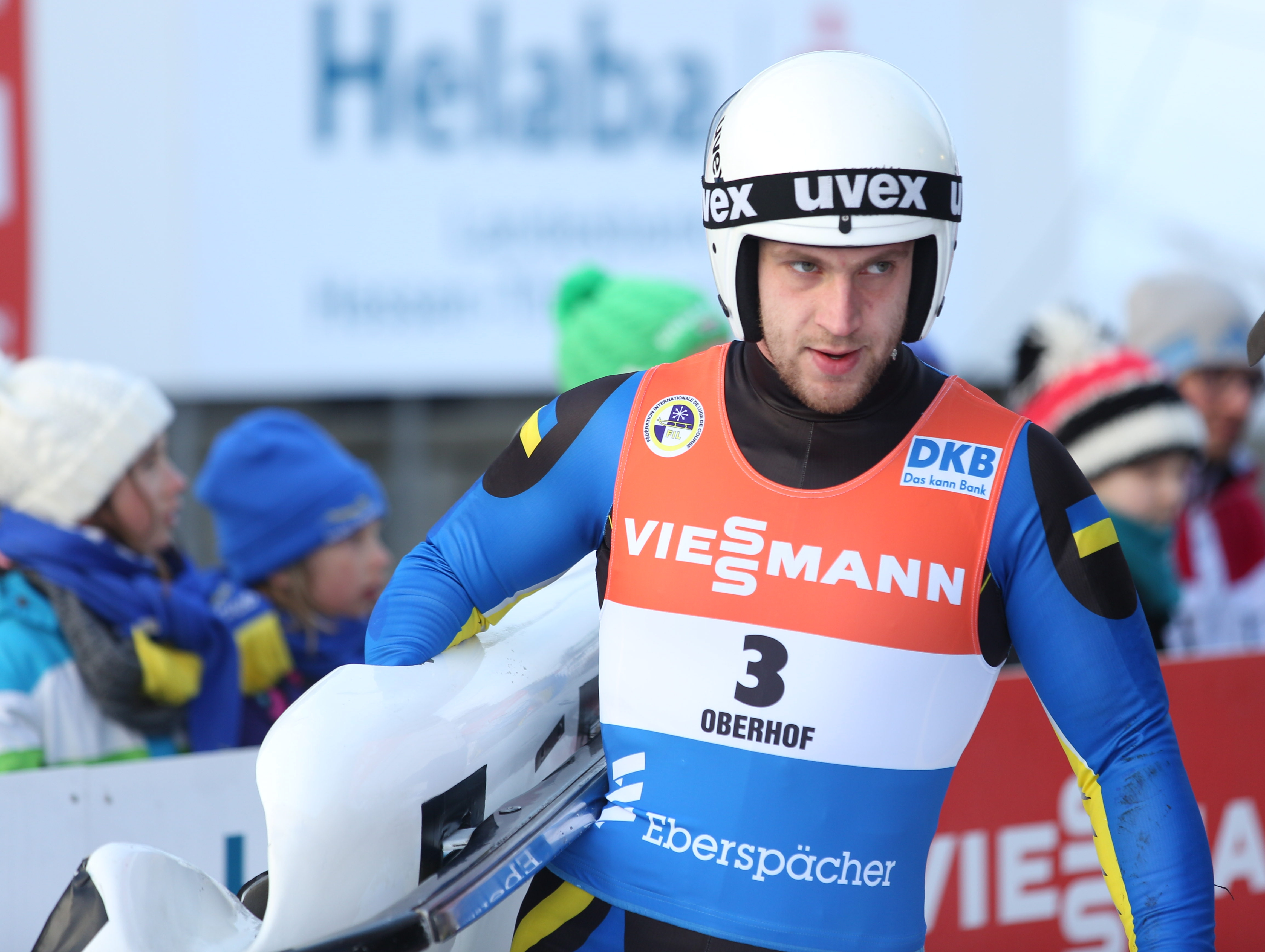 Roman Zakharkiv beim Worldcup Doppelsitzer Männer Oberhof 2017